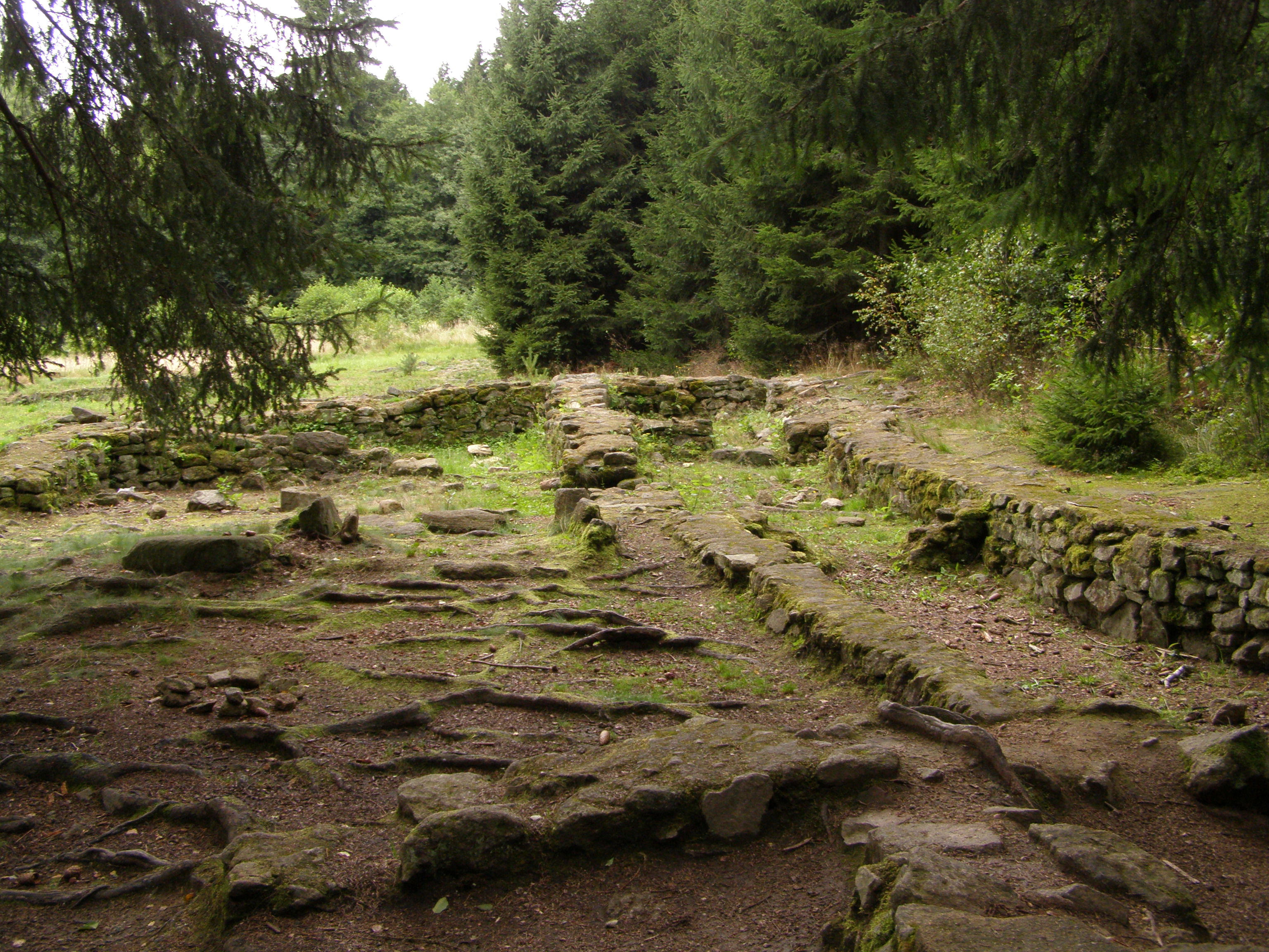 Zaniklá středověká osada Pfaffenschlag v katastru obce Slavonice